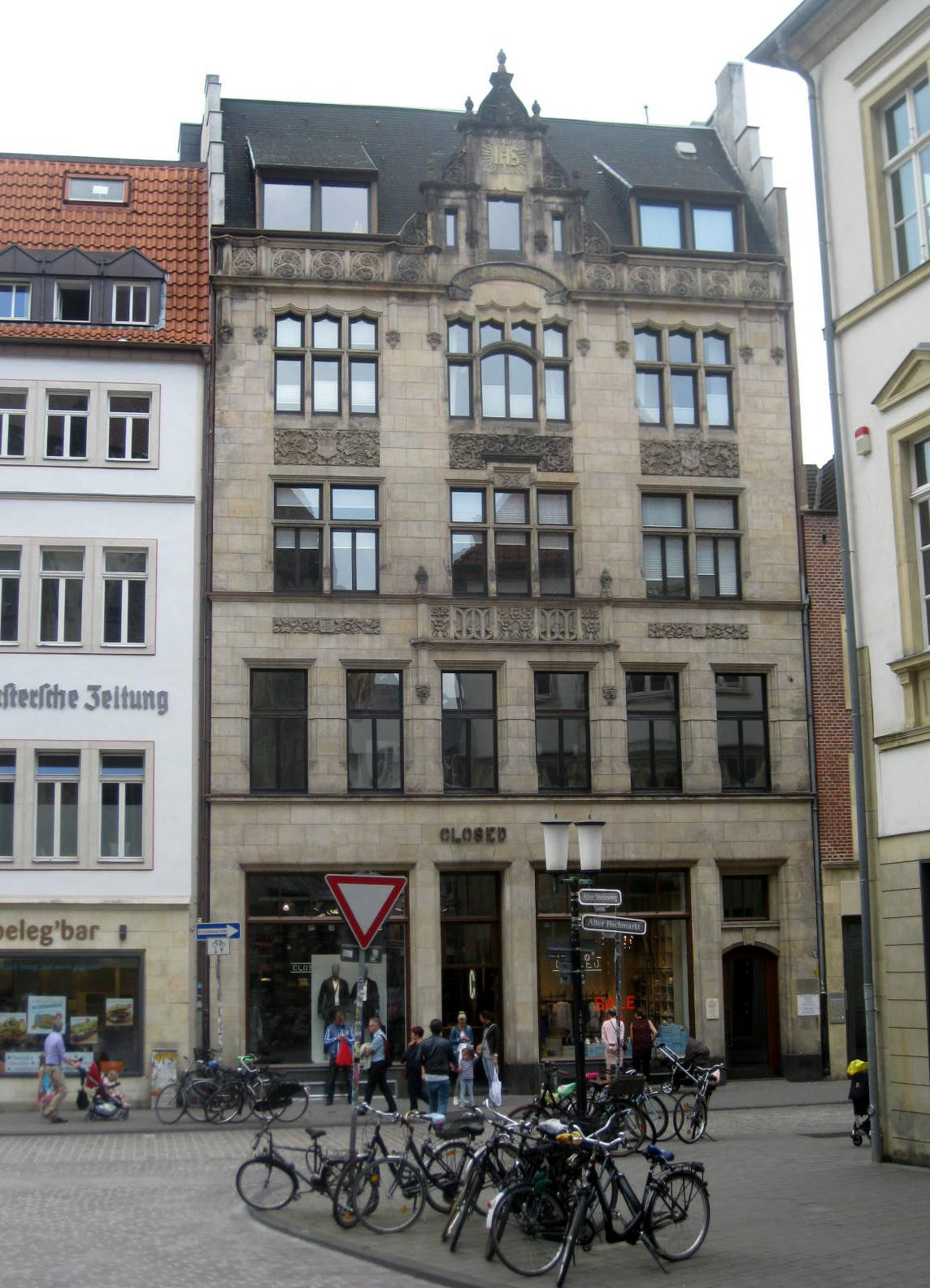 Die Großzügigkeit und schlichte Eleganz dieses Geschäfts- und Wohnhauses im mittelalterlichen Stadtkern Münster's steht noch heute für den Aufbruch des Bürgertum dieser Stadt ins 20. Jahrhundert.